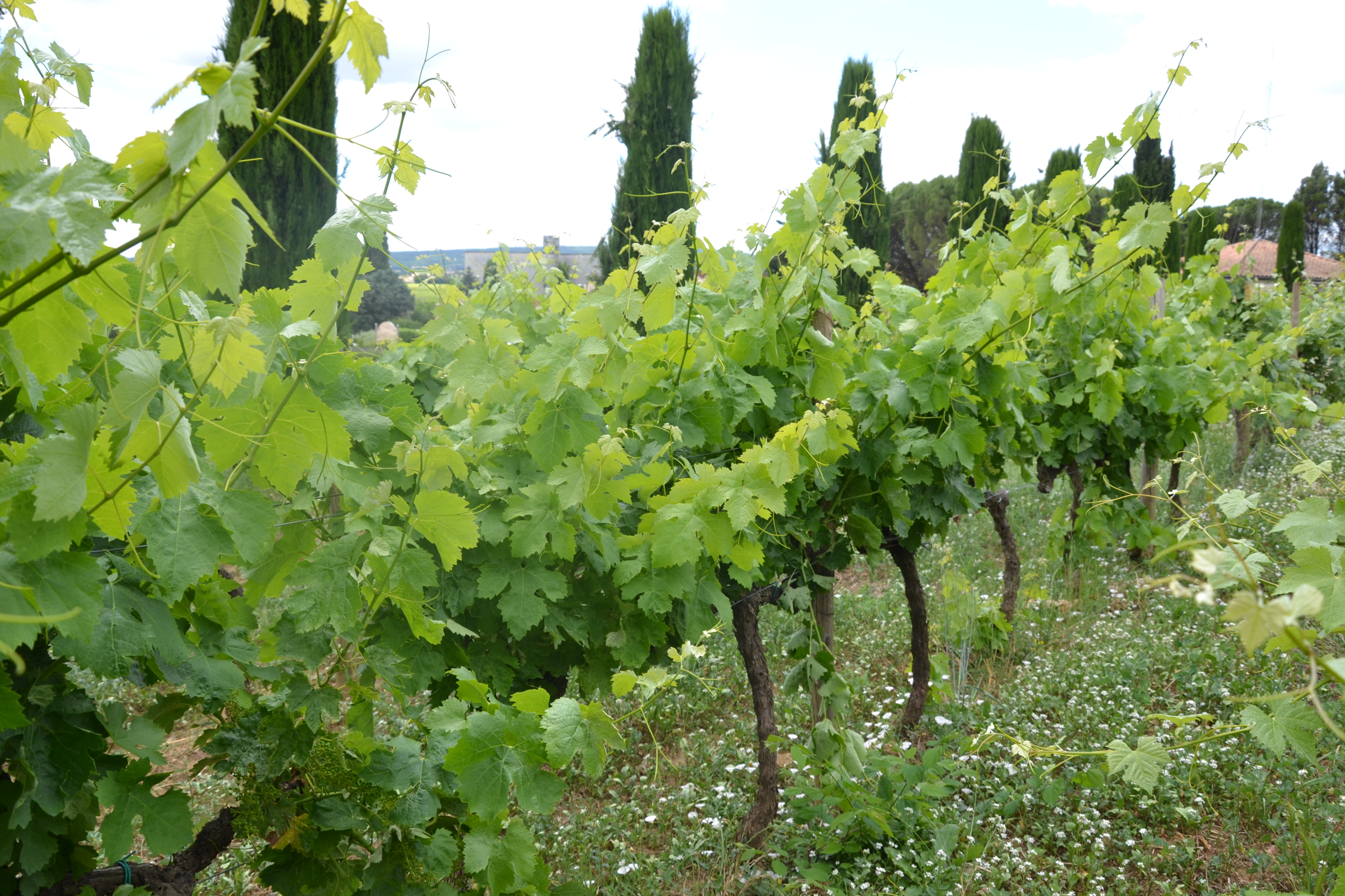 vignes de cépage Carignan